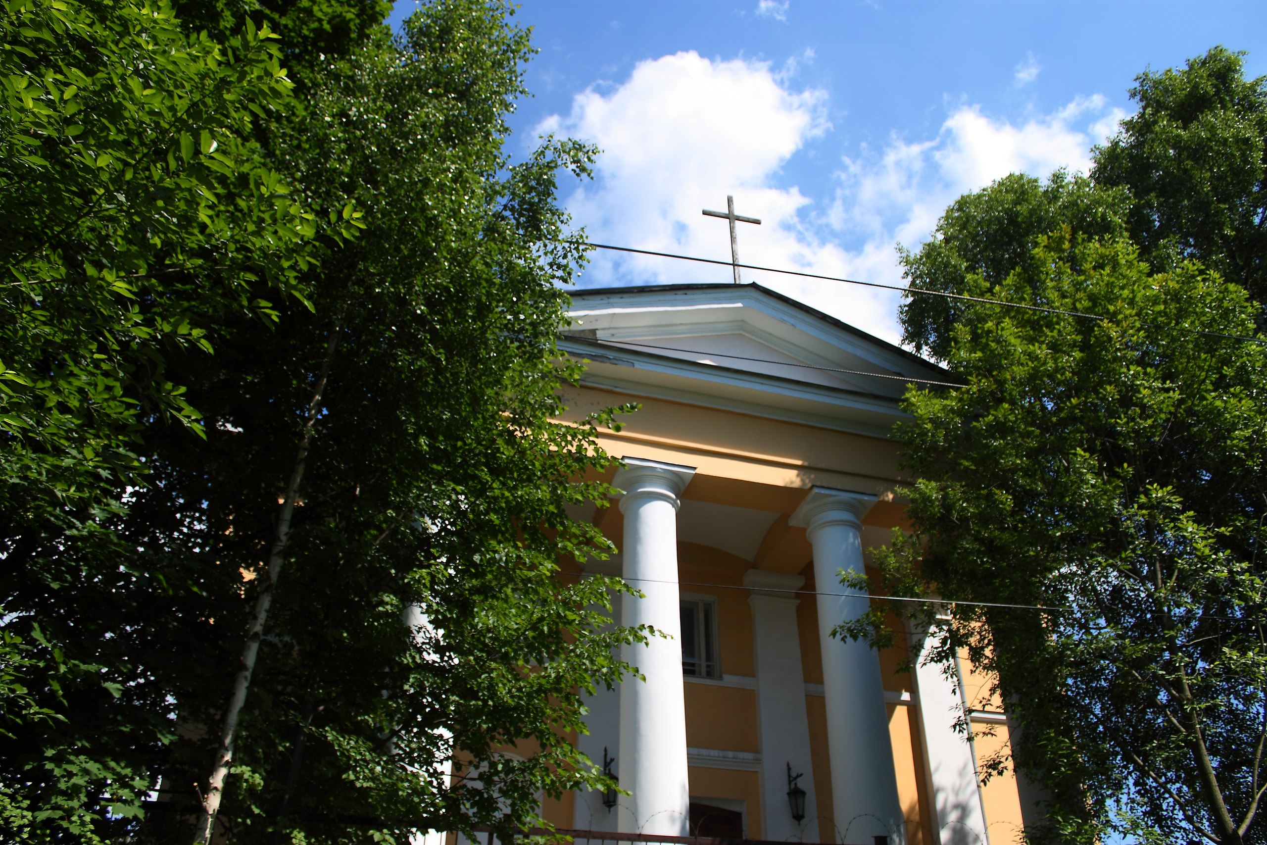 Лютеранская церковь святой Екатерины в Новосаратовке